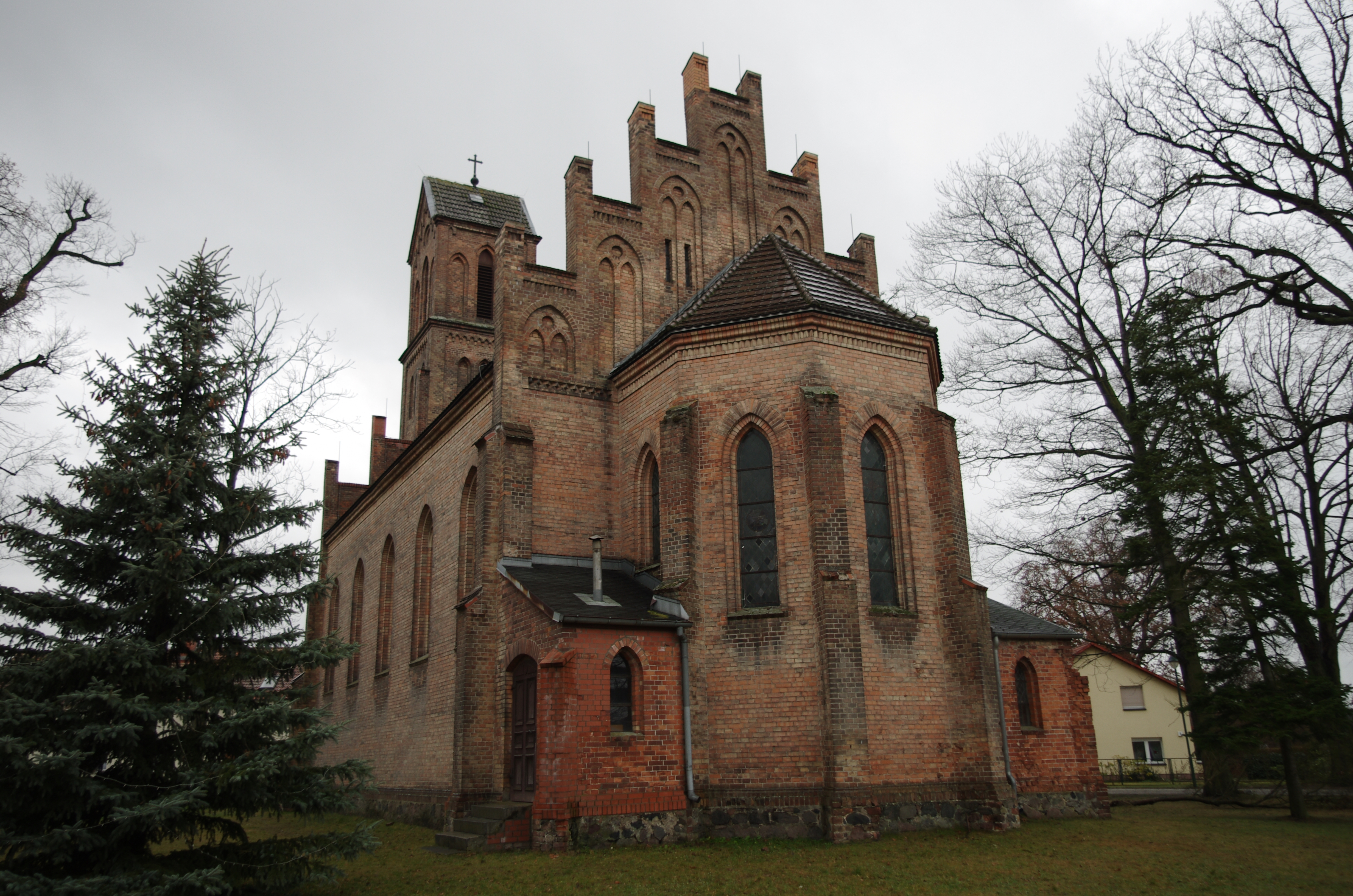 Königs Wusterhausen in Brandenburg. Die Kirche in Kablow steht unter Denkmalschutz. Sie steht in der Mitte des Dorfangers.